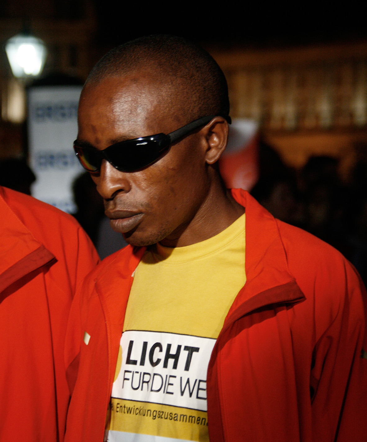 Francis Thuo Karanja (Vienna Night Run 2009, Wien)